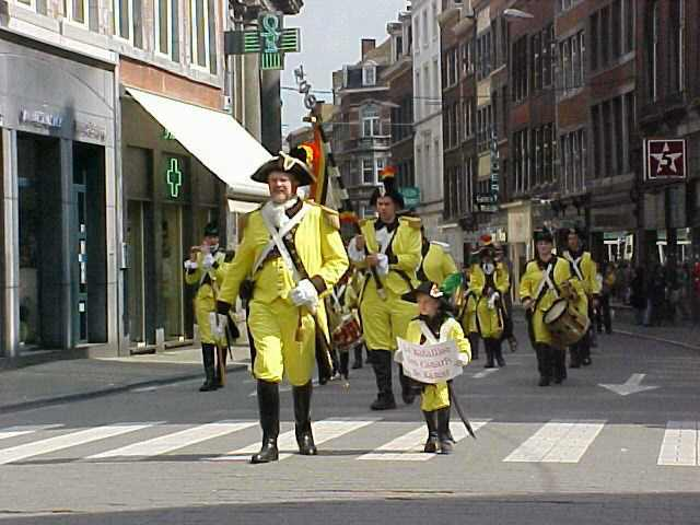 Régiment des Canaris